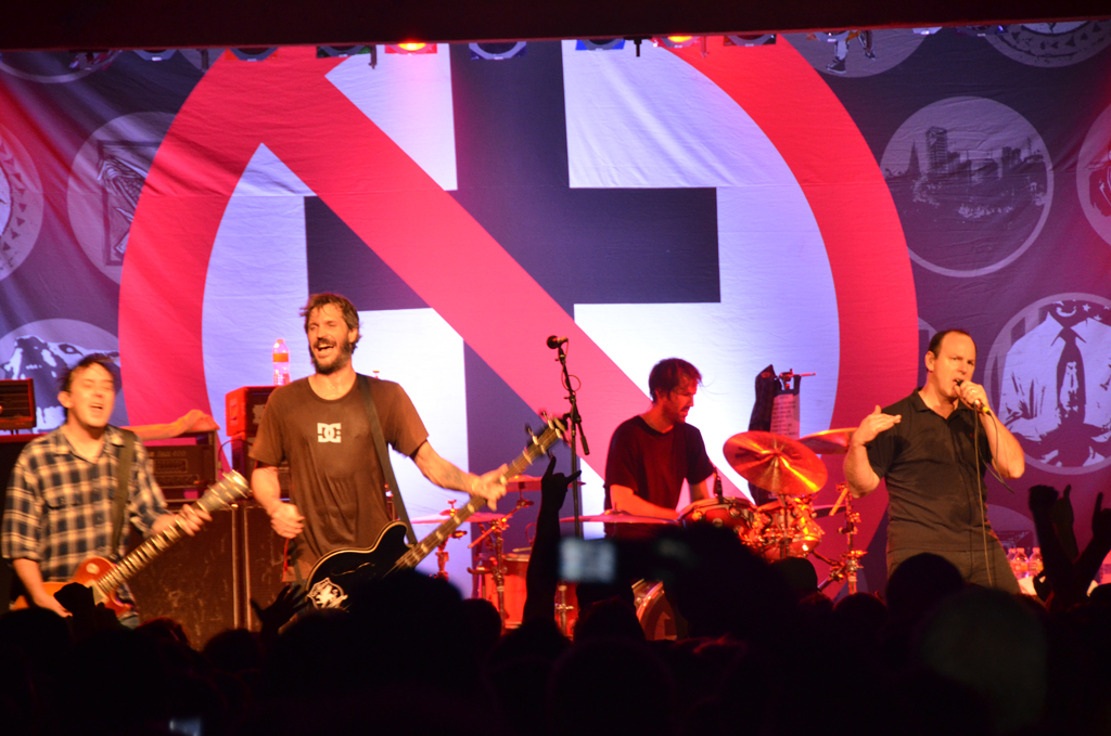 Bad Religion